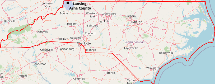 Carte réalisée sur umap This map may be incomplete, and may contain errors. Don't rely solely on it for navigation.